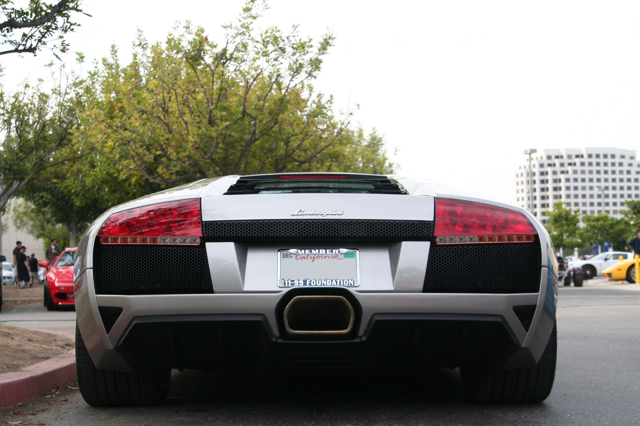 Ecru Lamborghini Murciélago